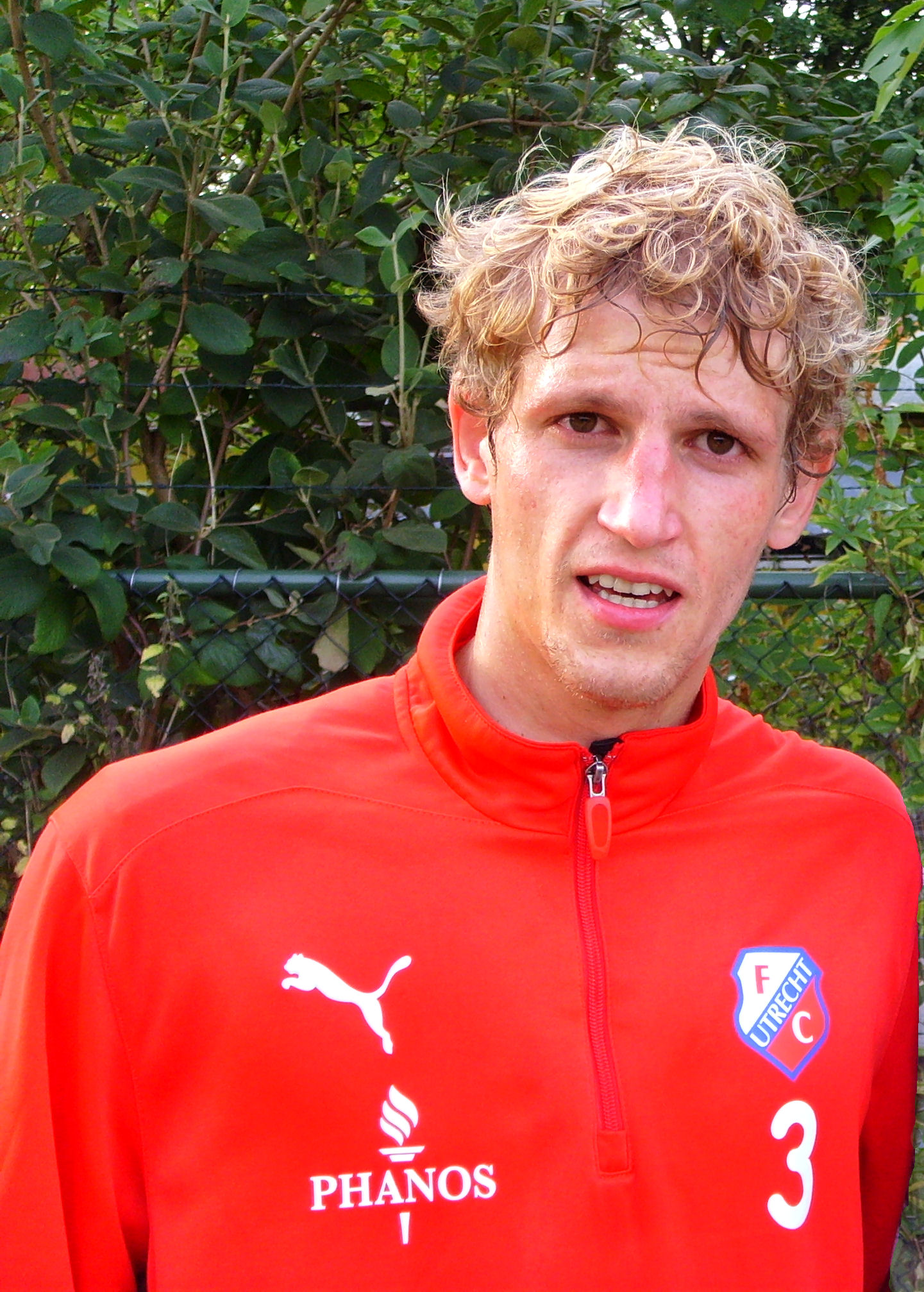 Mihai Neşu, Roemeens voetballer, na een training van FC Utrecht.